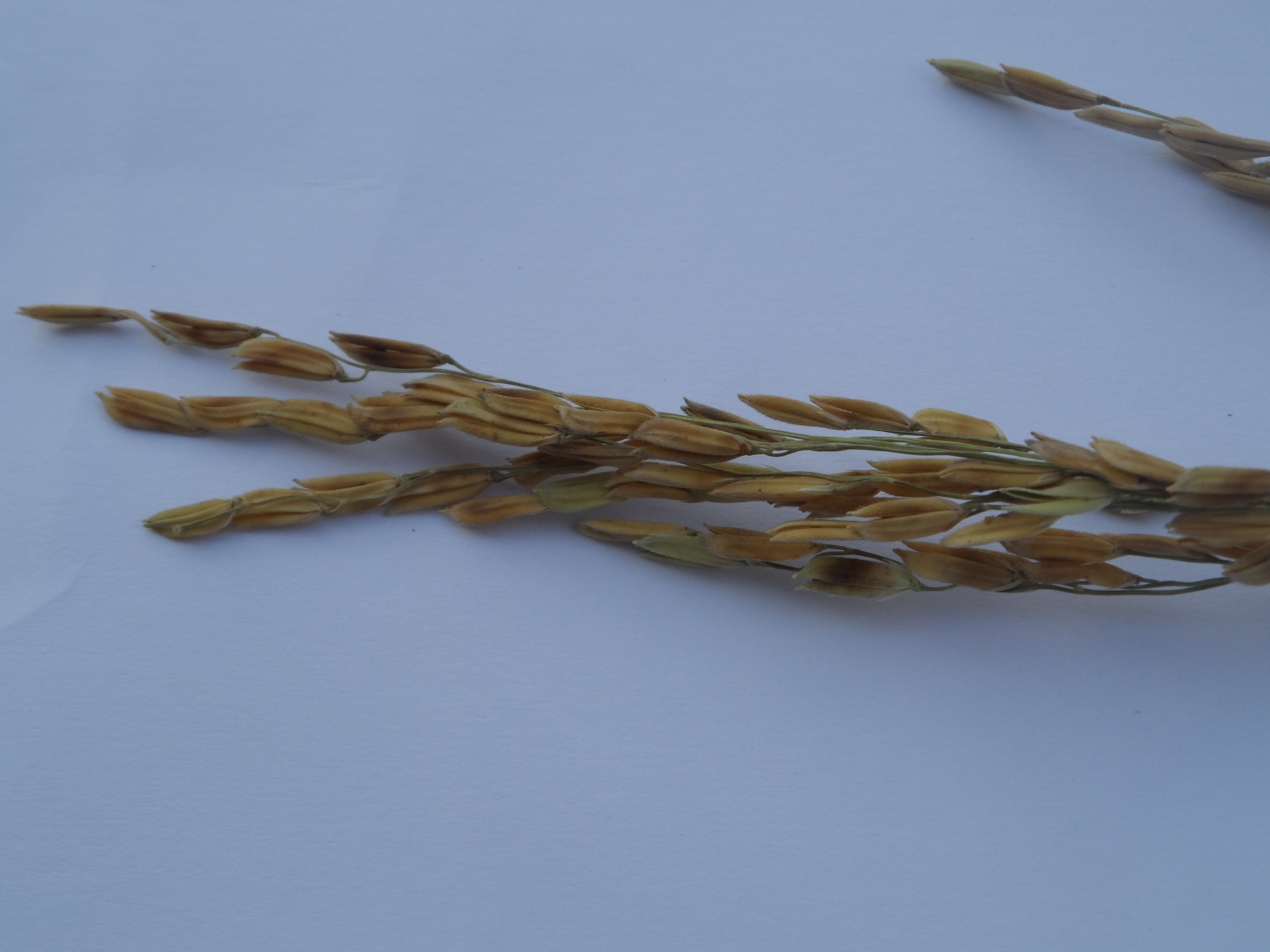 Sintomas de B. glumae